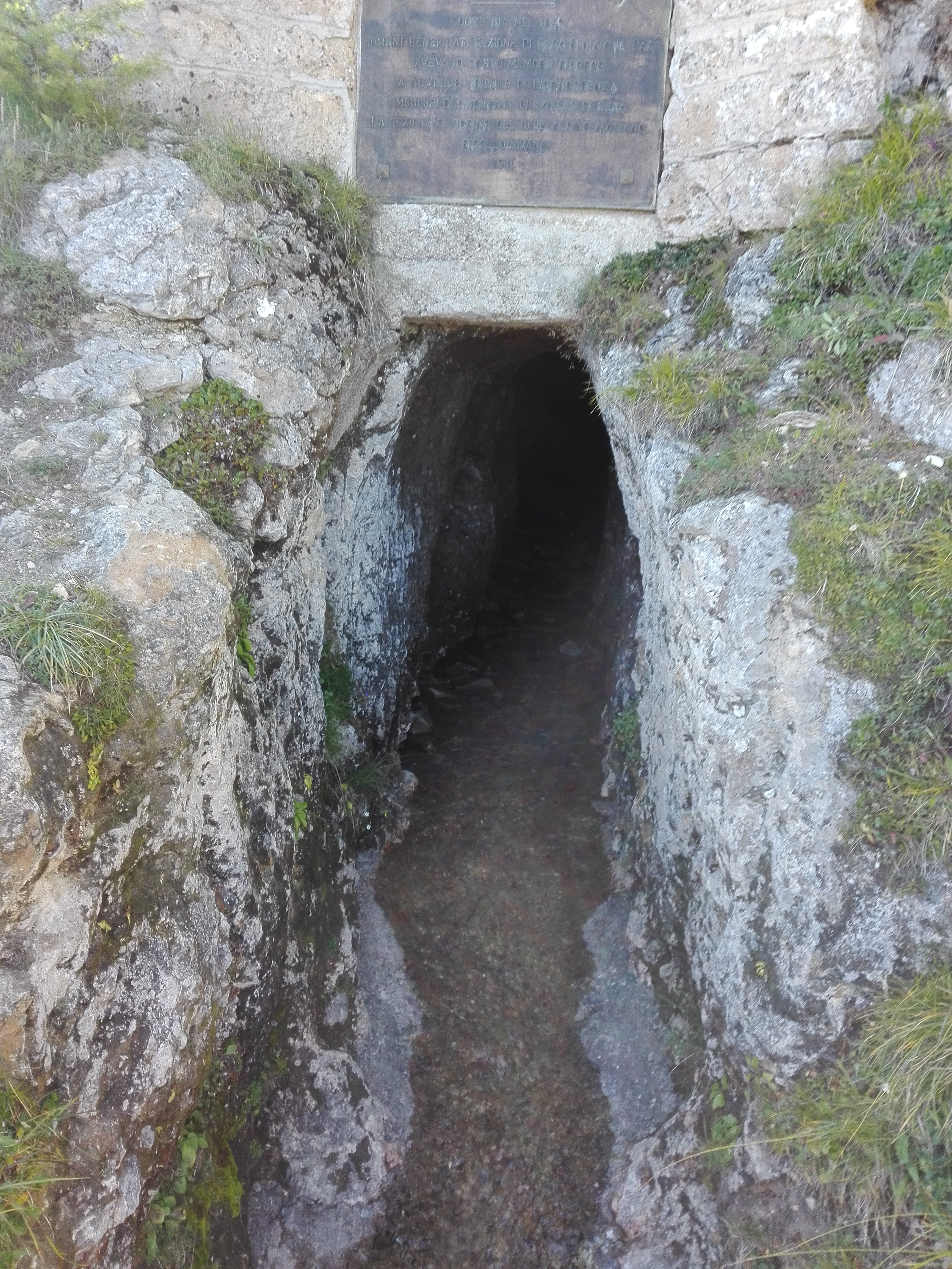 Il Gran Pertus di Colombano Romean sopra Chiomonte in Val di Susa. Ingresso a valle.